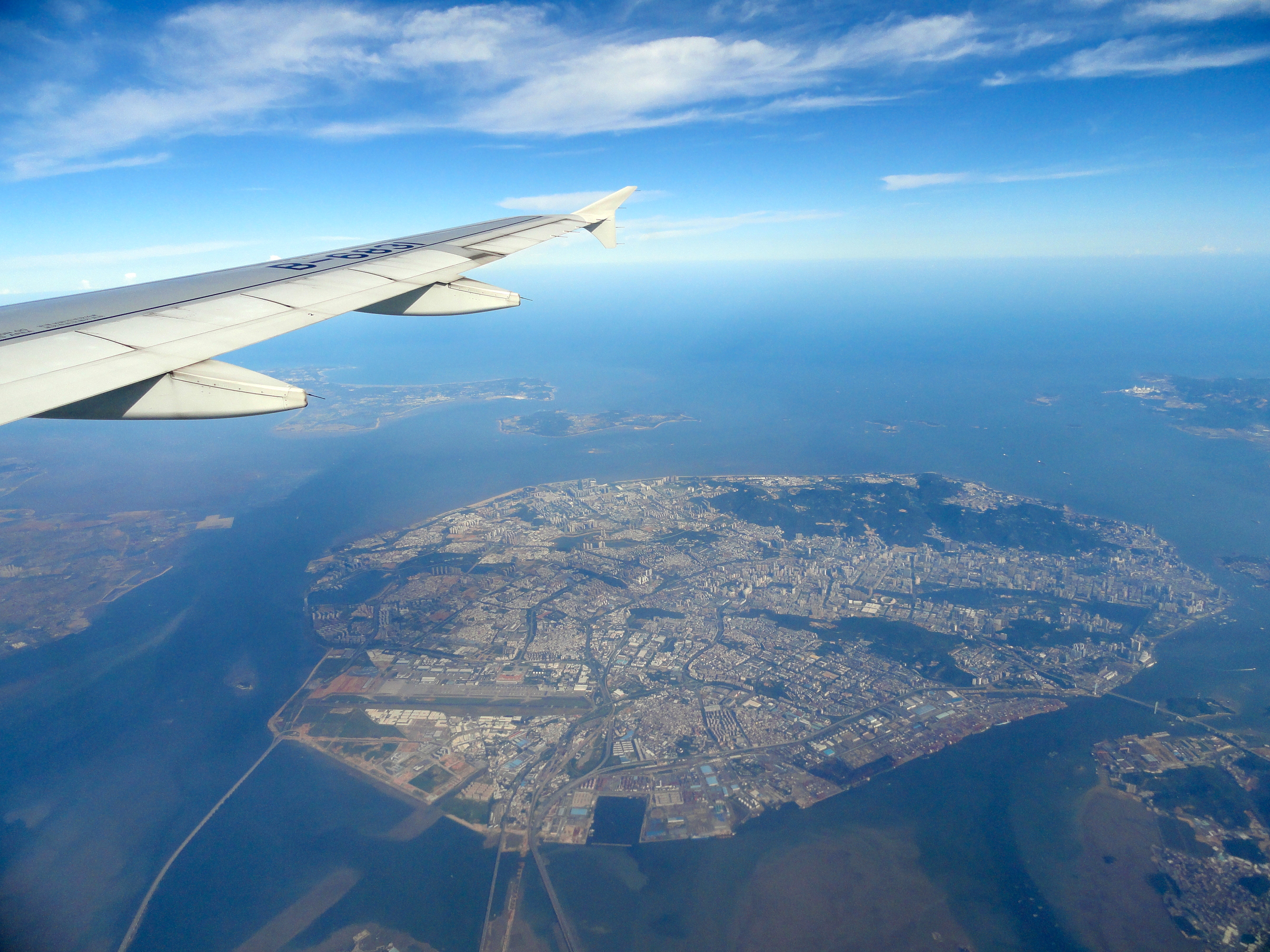 中文（中国大陆）: 厦门岛航空图